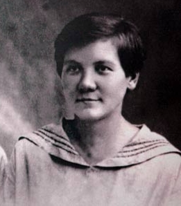 Нина Петровна Кухарчук. Украинская ССР, 1924 г.